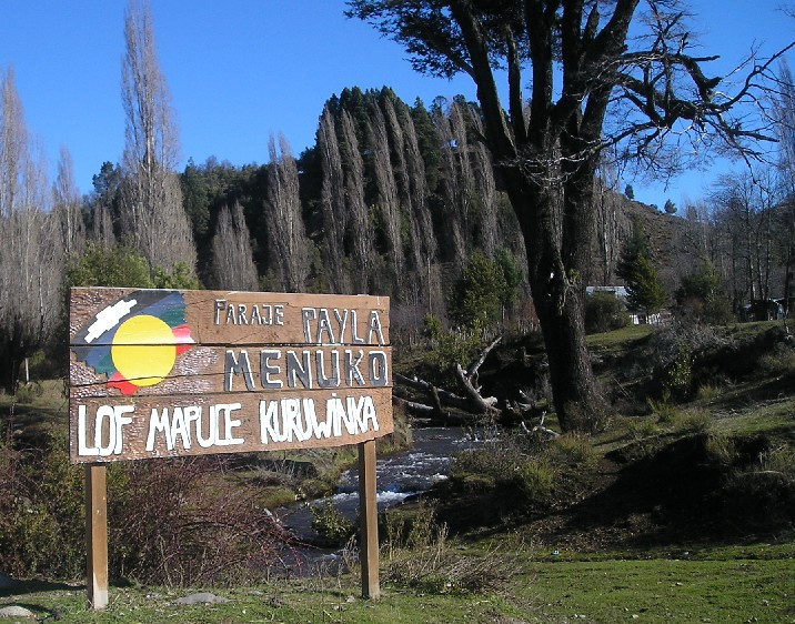 Lof Mapuche Kuruwinka, Neuquén, Argentina